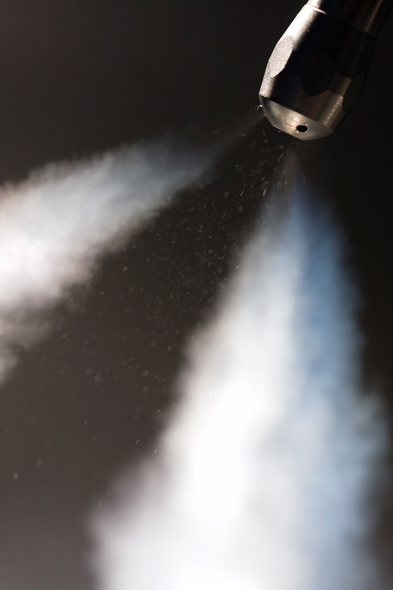 Para wodna tworzona przez dyszę ekspresu do kawy